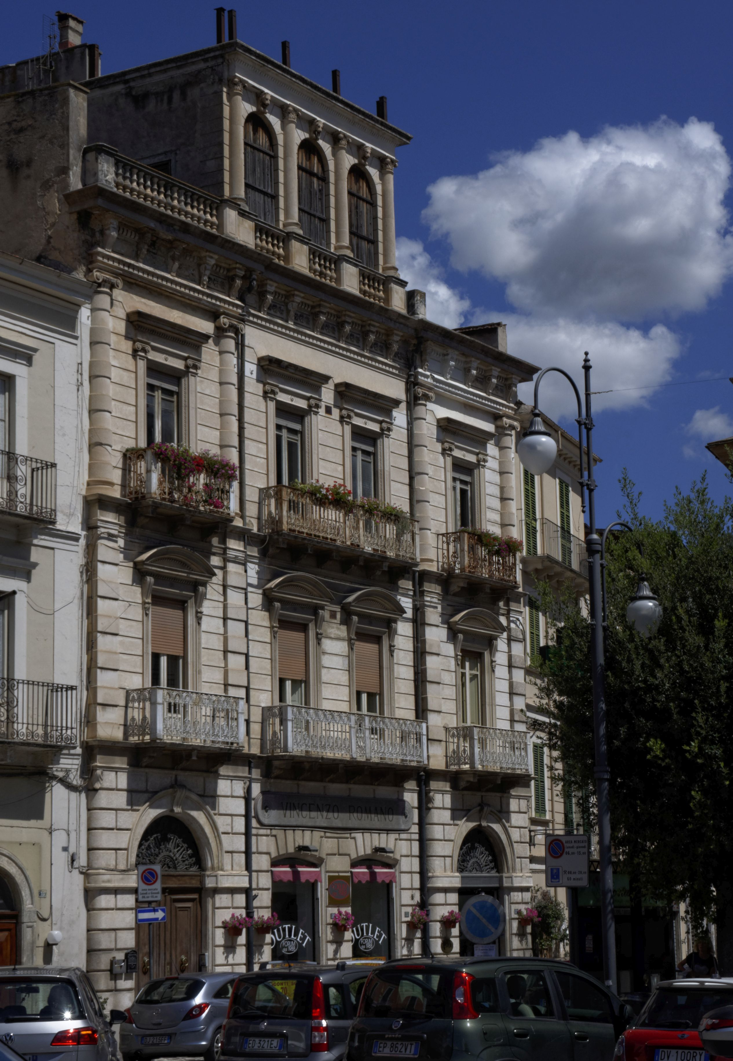 Popoli - 2017